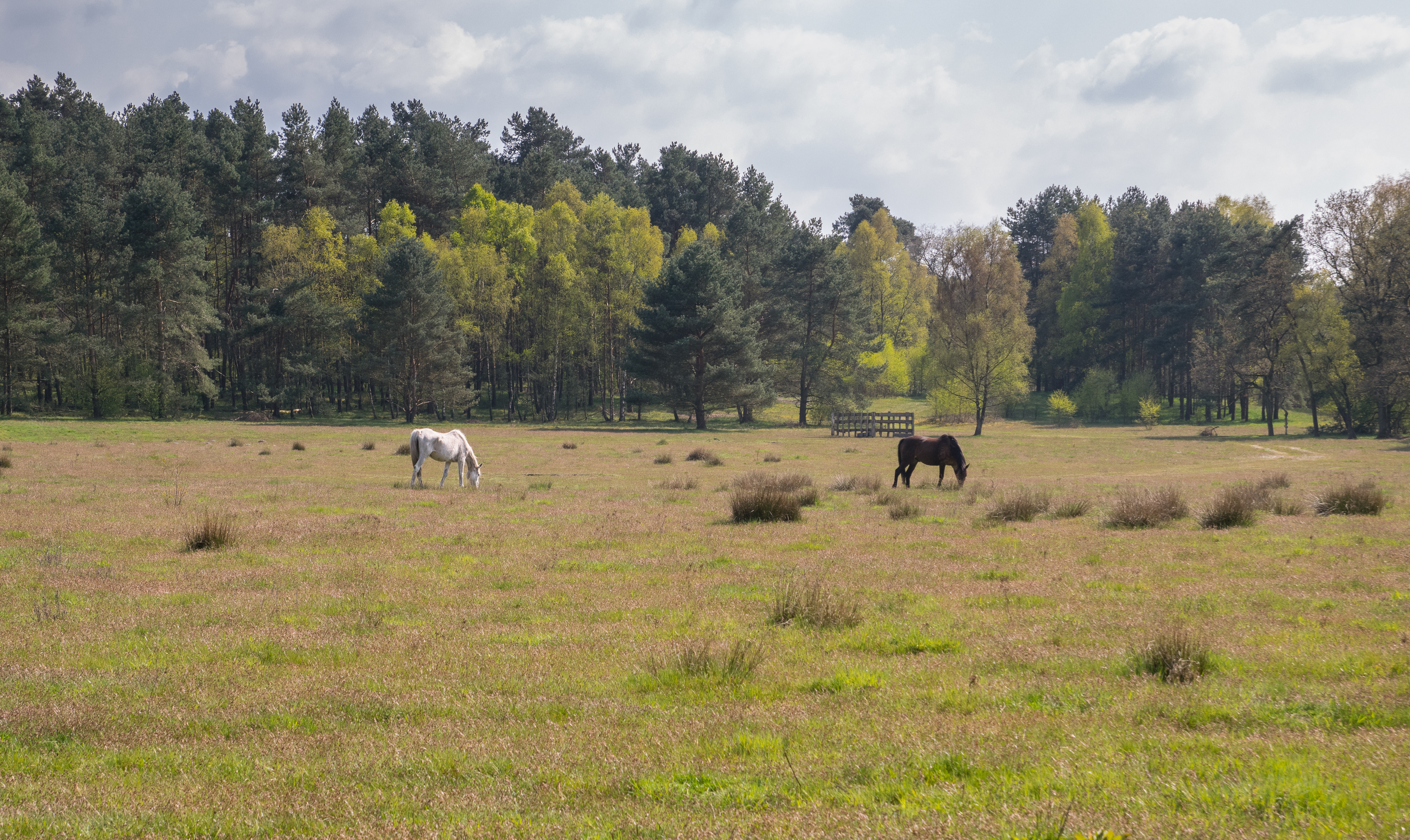 Extrem gefährdete Nutztierrasse "Senner Pferde" im Naturschutzgebiet Moosheide.